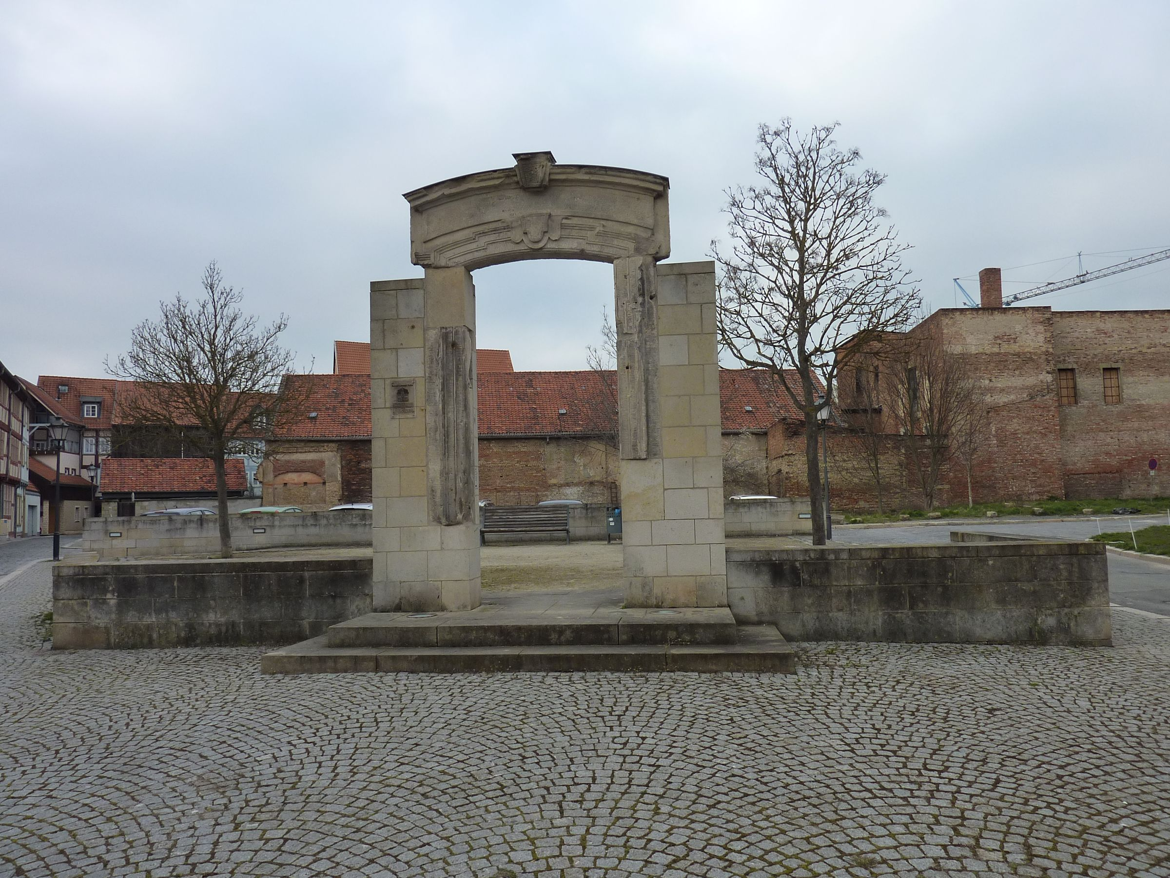 Überreste des Berend-Lehmann-Palais in Halberstadt